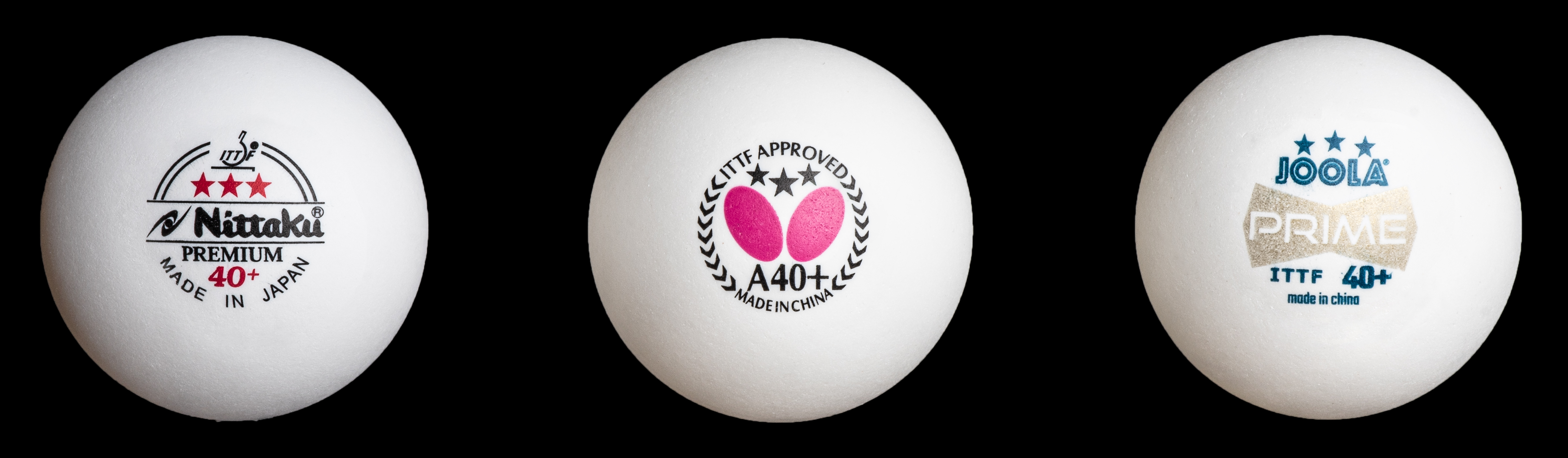 Tischtennisbälle 40+ aus Plastik (mit ITTF-Zulassung)